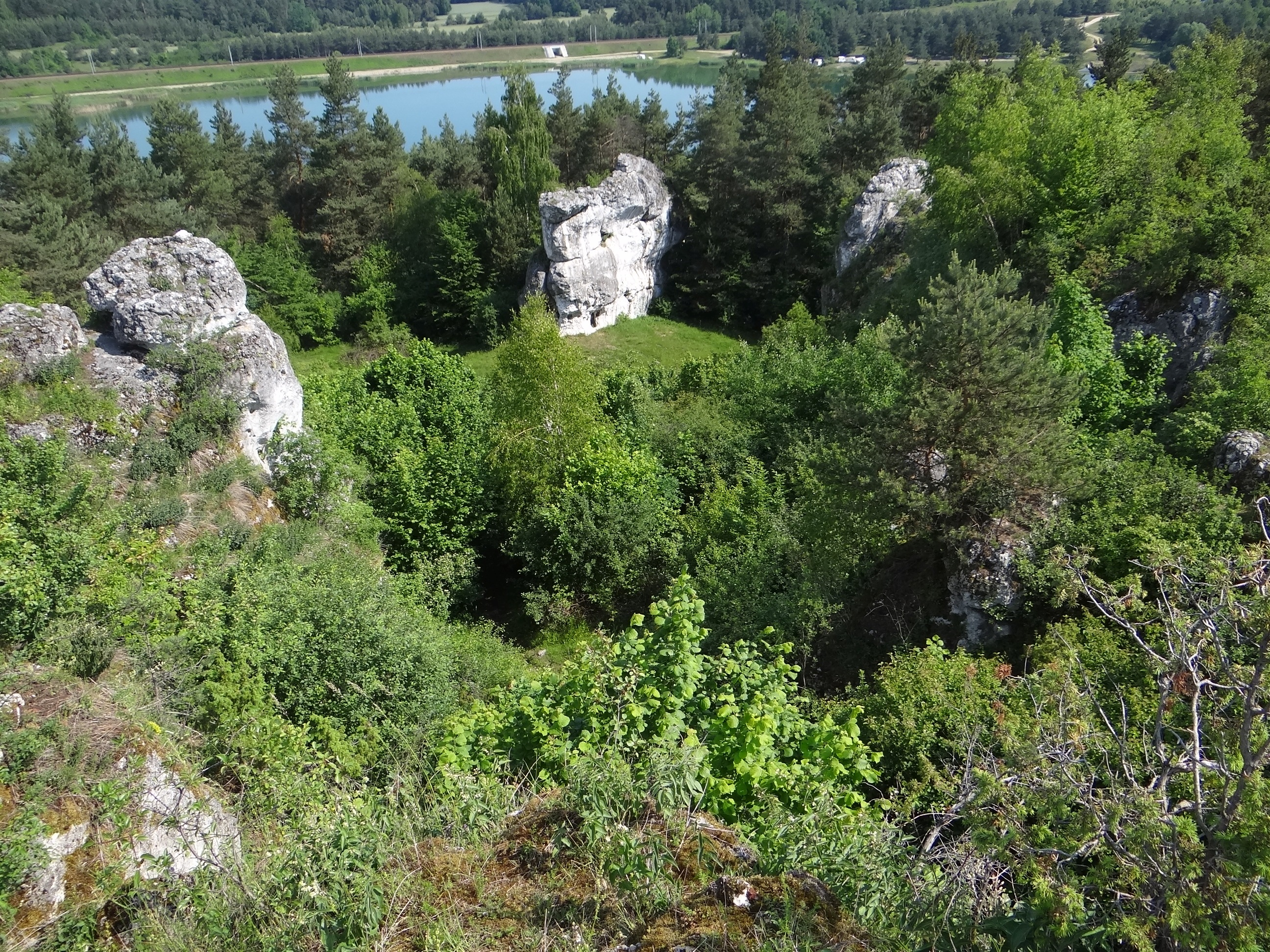 Wapienne skałki na wzgórzu Słupsko